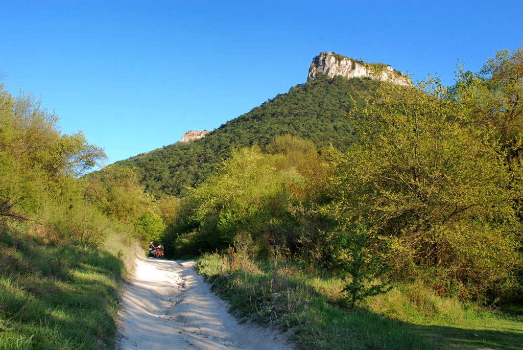 Гора останец «Мангуп-Кале», Бахчисарайській р-н, с. Залісне